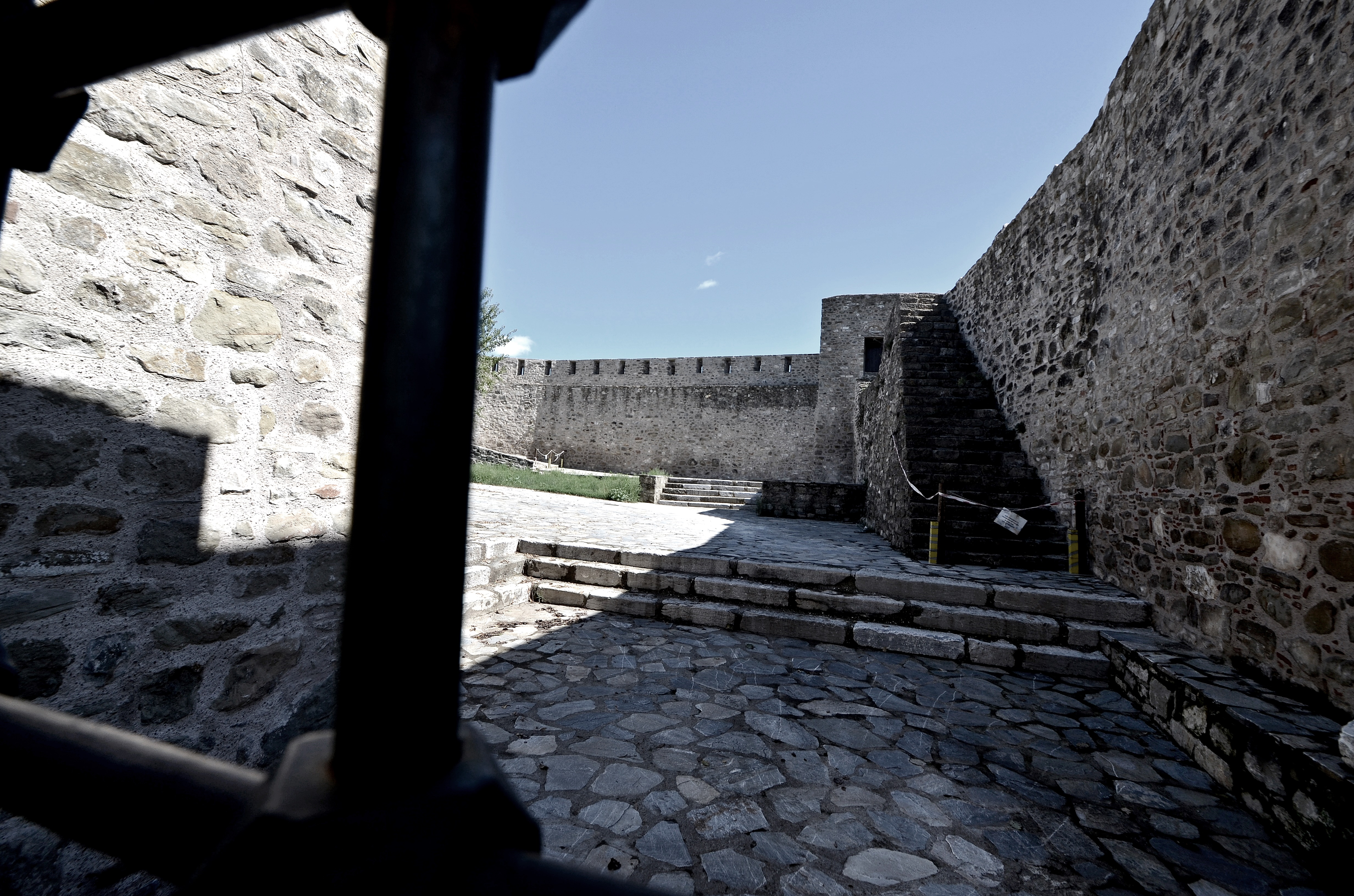 Βυζαντινό Κάστρο Τρικάλων, παλιά πόλη Βαρούσι«Βυζαντινό Κάστρο Τρικάλων, παλιά πόλη Βαρούσι»